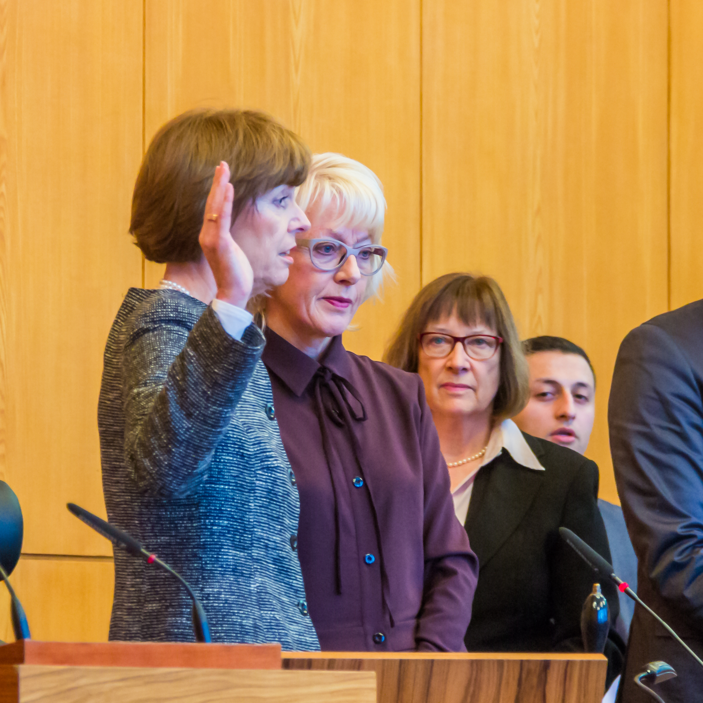 Vereidigung und Amtseinführung von Oberbürgermeisterin Henriette Reker Foto: Oberbürgermeisterin Henriette Reker leistet den Amtseid ab. Rechts daneben. Bürgermeistern Elfi Scho-Antwerpes